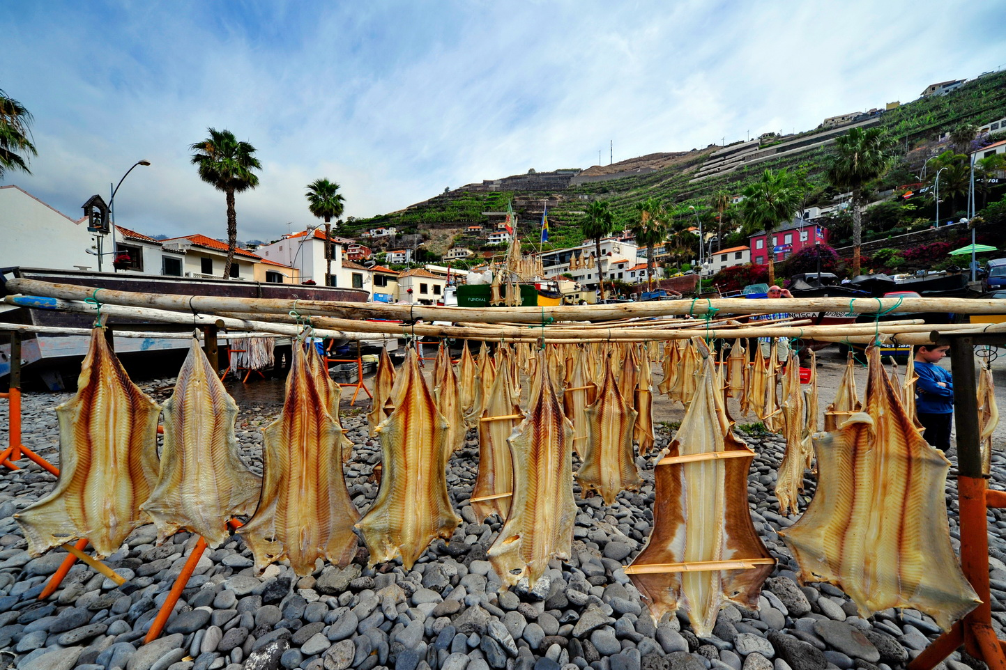 Câmara de Lobos, Hafen mit Trockenfisch